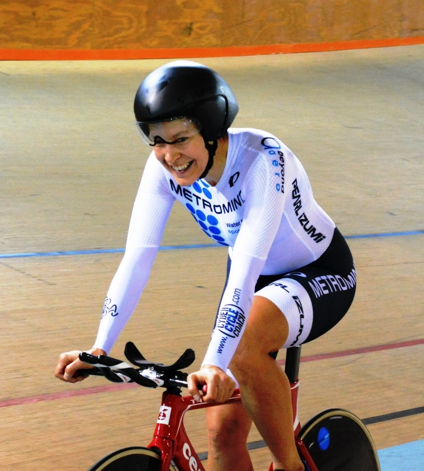 Molly Shaffer Van Houweling, Stundenweltrekord im Velodromo Bicentenario in Aguascalientes, Mexiko